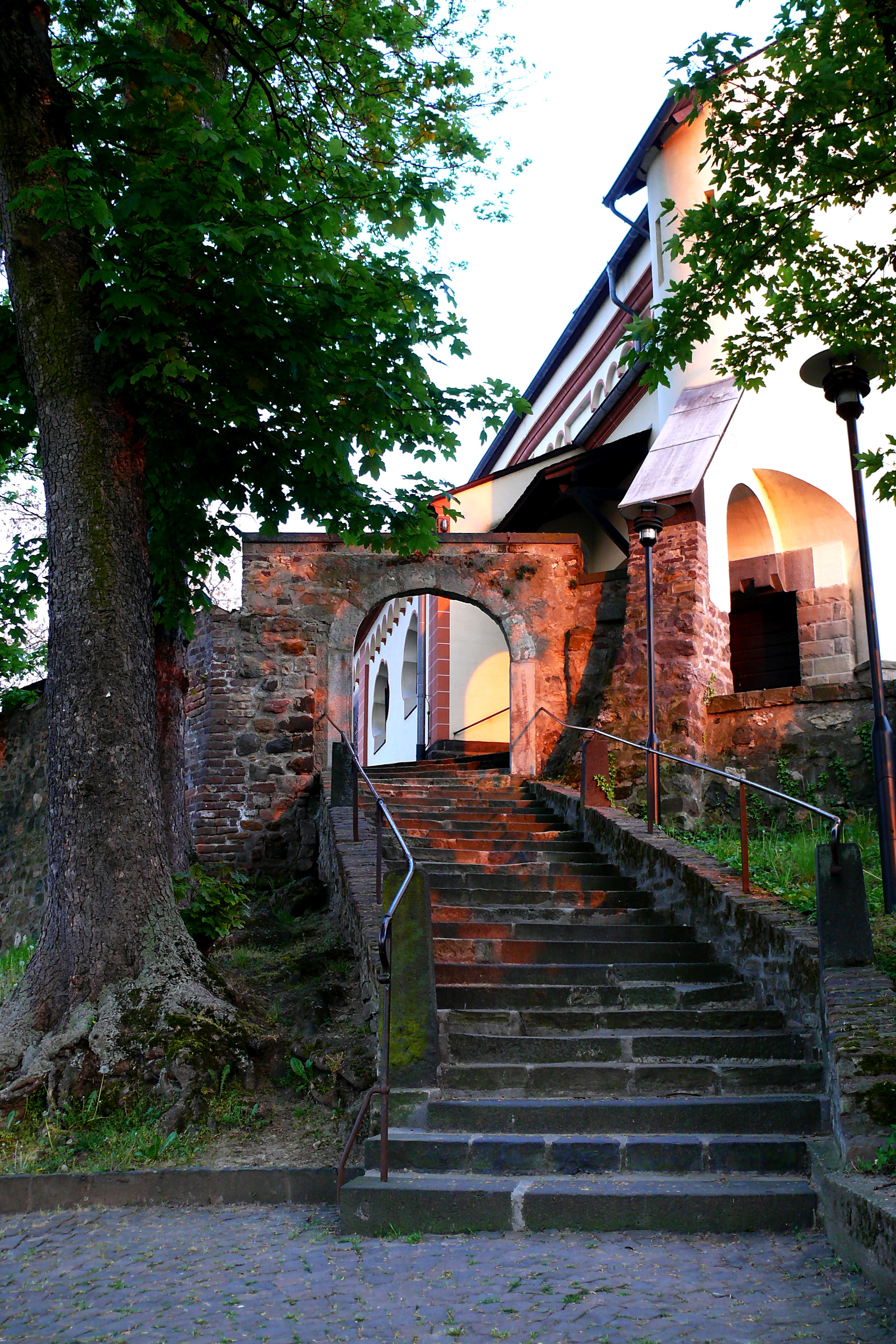 Die Kirchentreppe von St. Peter, Lengsdorf